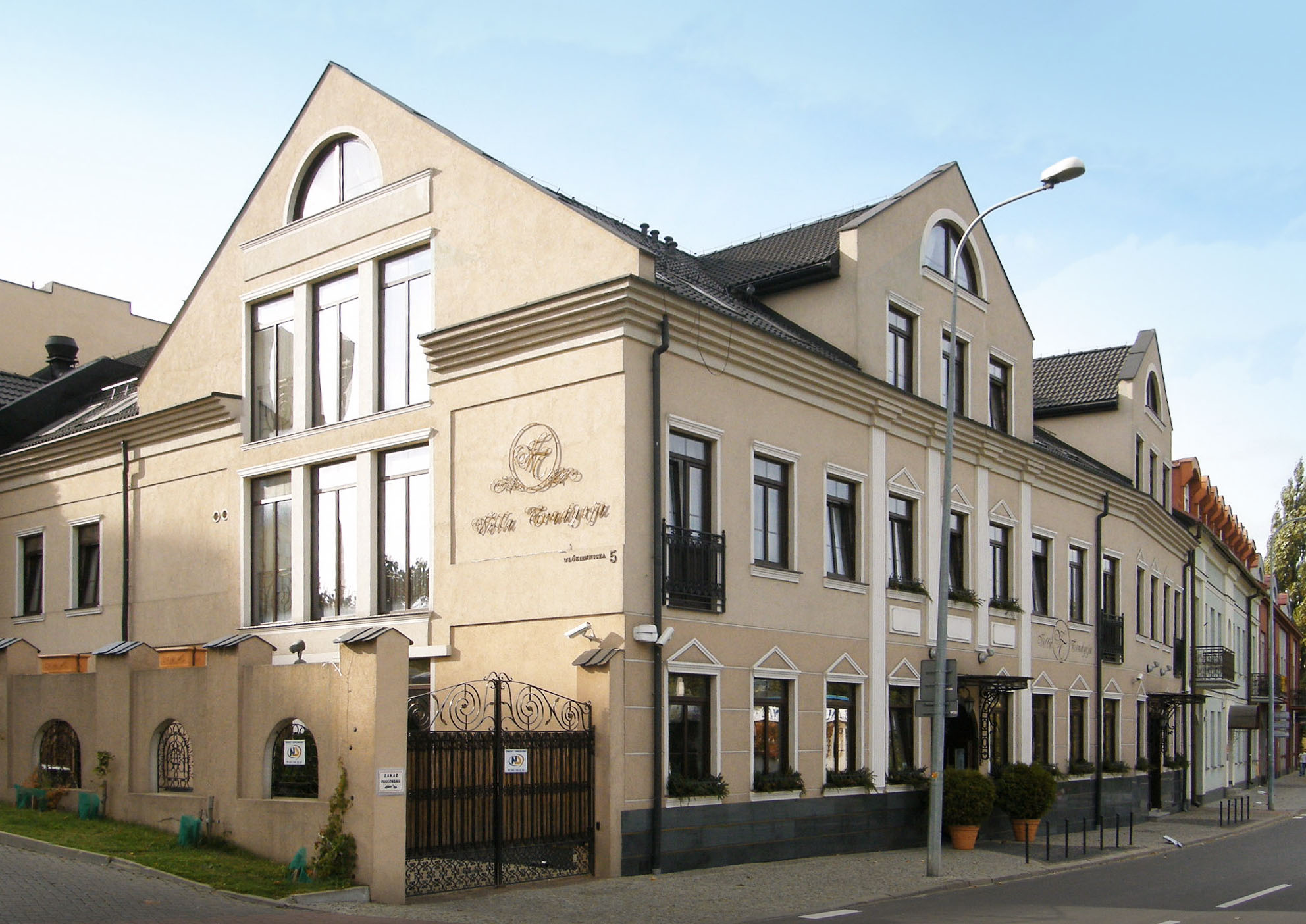 Zespół d. fabryki Wolfa Zilberblatta: Budynek mieszkalno-administracyjny „G” Tkalnia „H” Tkalnia „K” Przędzalnia „L” Białystok, ul. Włókiennicza 7/9, Białystok 03.1988.